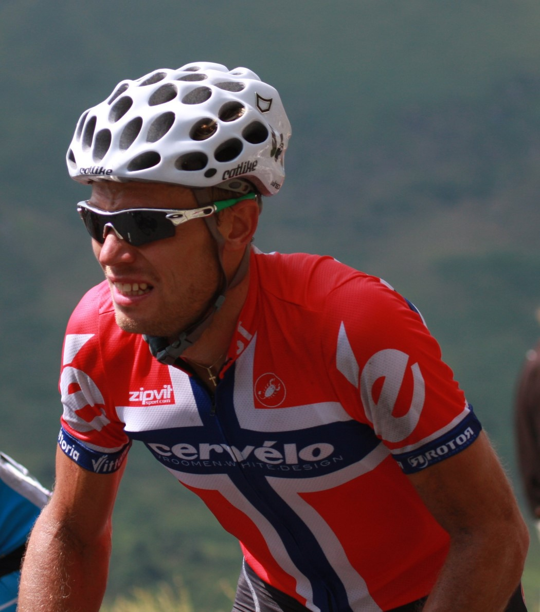 5891 hushovd met contador over de aubisque